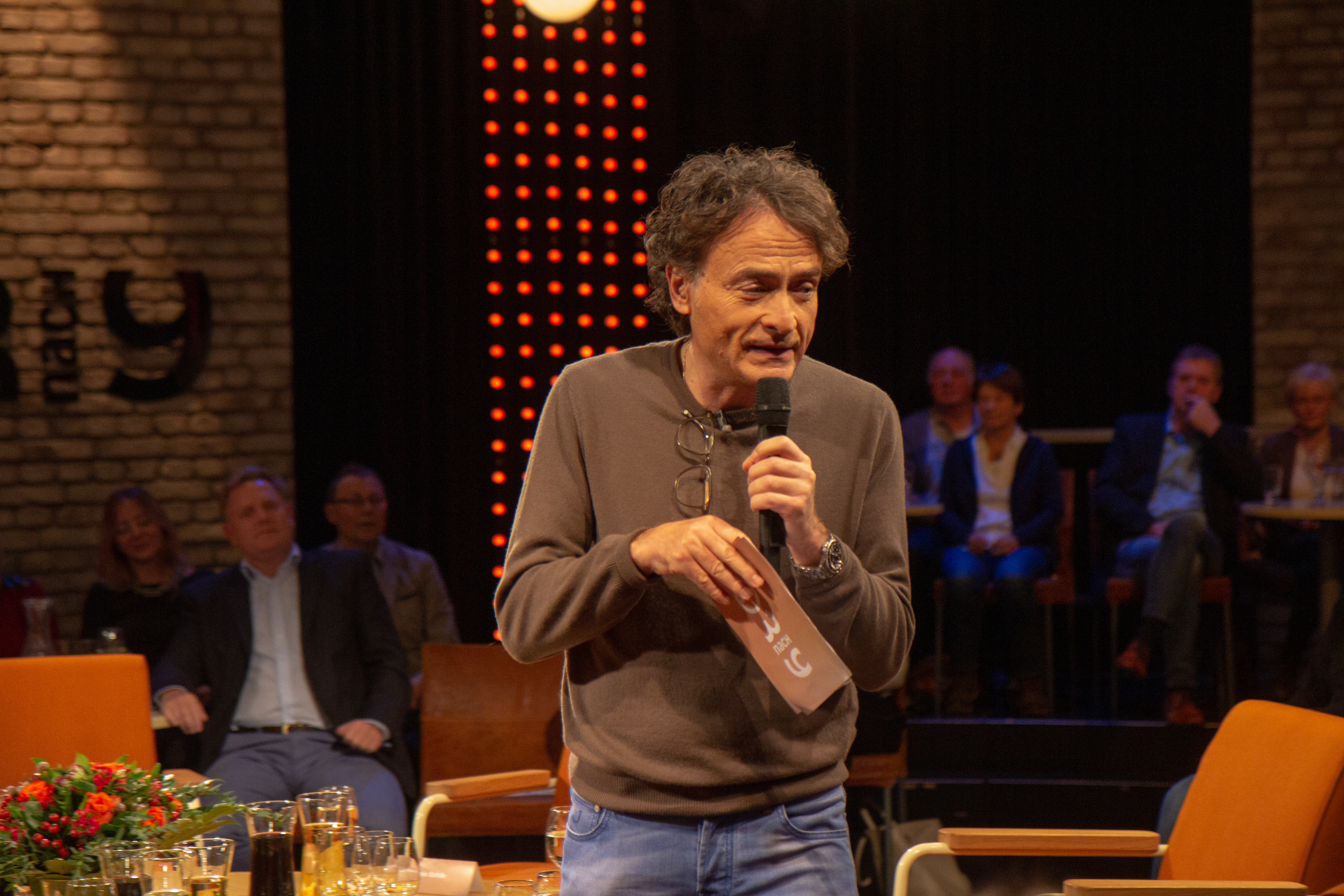 Giovanni di Lorenzo: Sendung 3 nach 9 am 23. November 2018 in Bremen